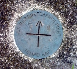 Airport Reference Point, Berlin Tempelhof